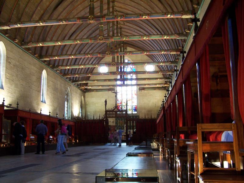 Salle de soin des hospices de Beaune en Bourgogne